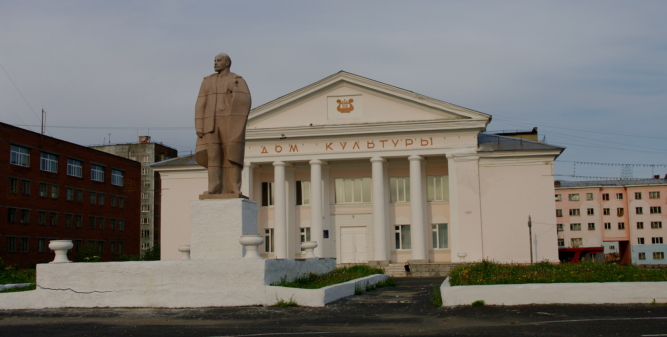 Дом культуры в Дудинке